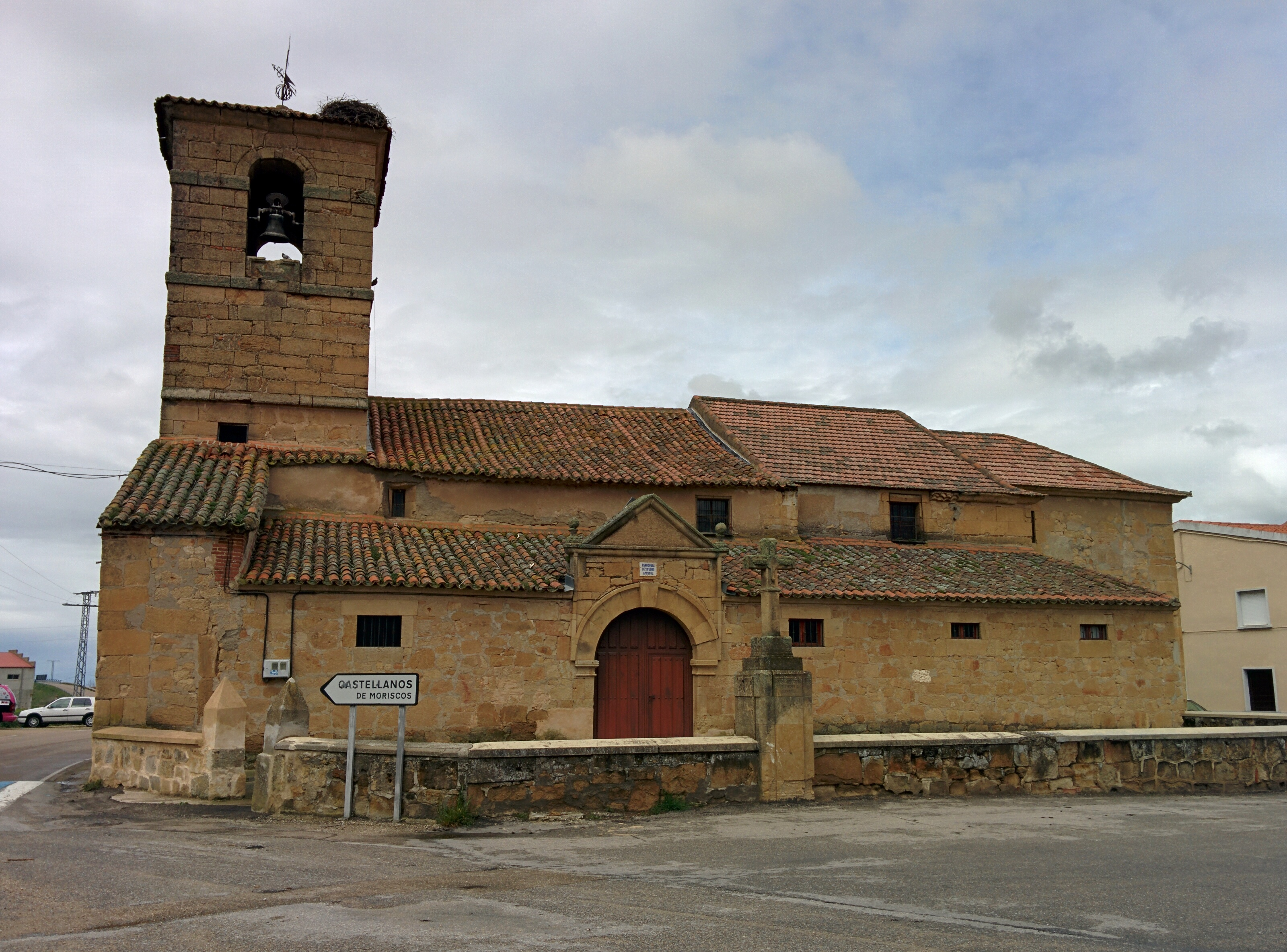 Iglesia de San Pedro Apóstol, en Moriscos (Salamanca, España).